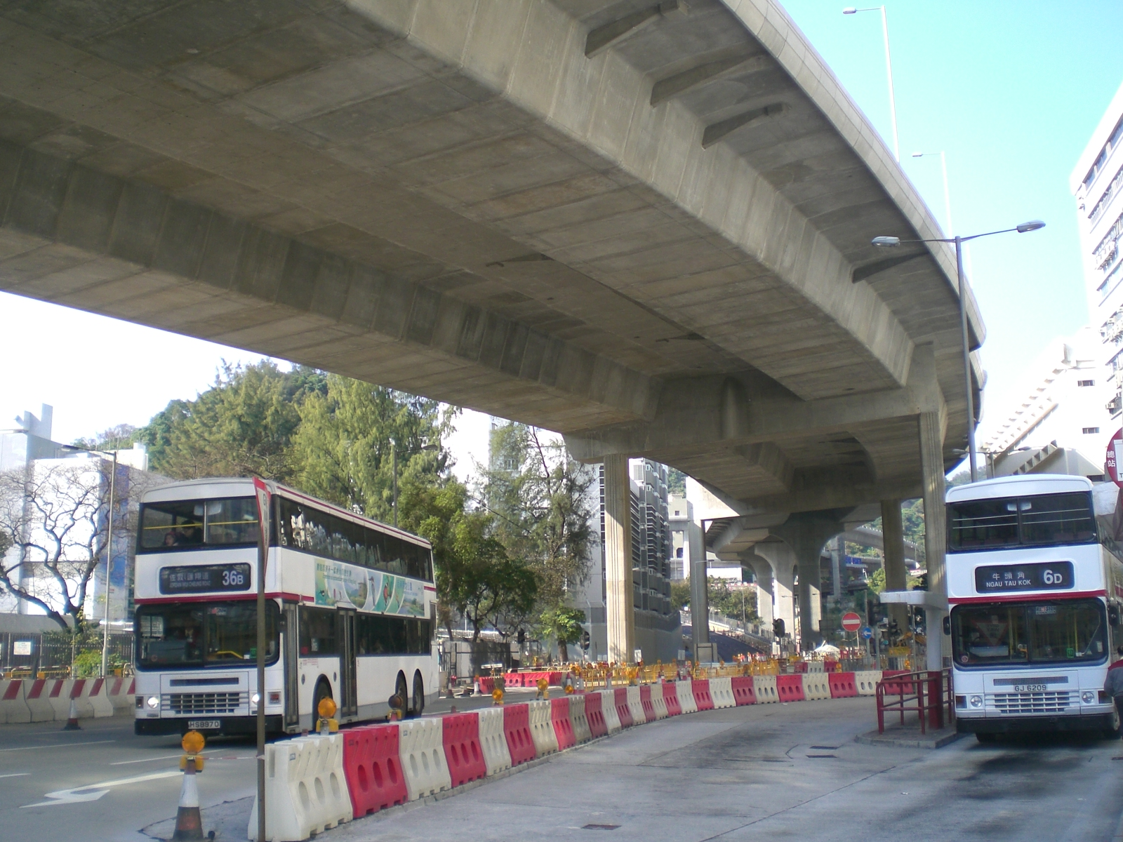 荔枝角蝴蝶谷道行車天橋及巴士站